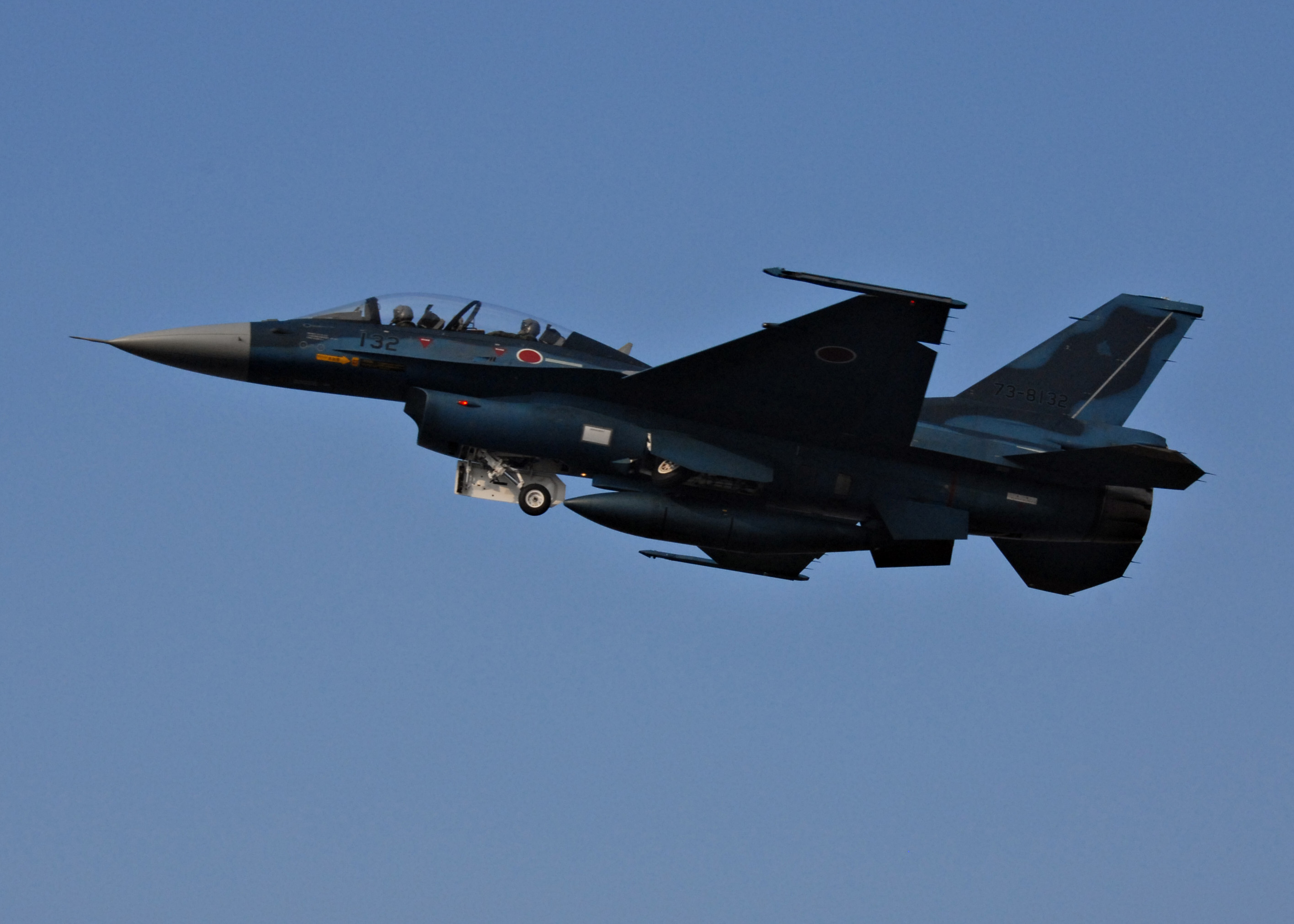 三沢基地を離陸した第3飛行隊所属のF-2B (132)。日米共同格闘戦訓練 「セイカン・ウォー」（2008年3月10日～13日実施）[1]に参加中。